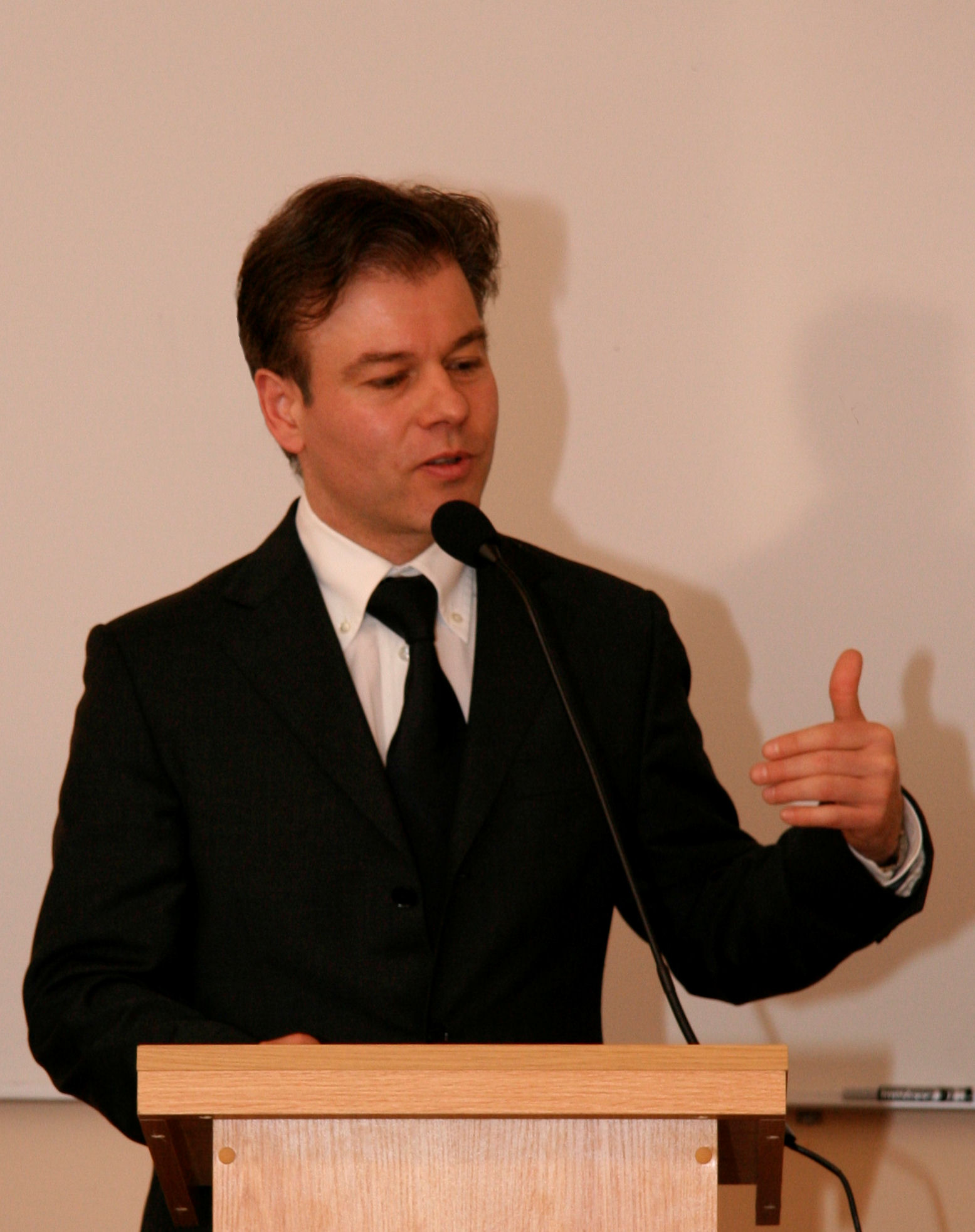 Prof. Dr. theol. Christof Breitsameter